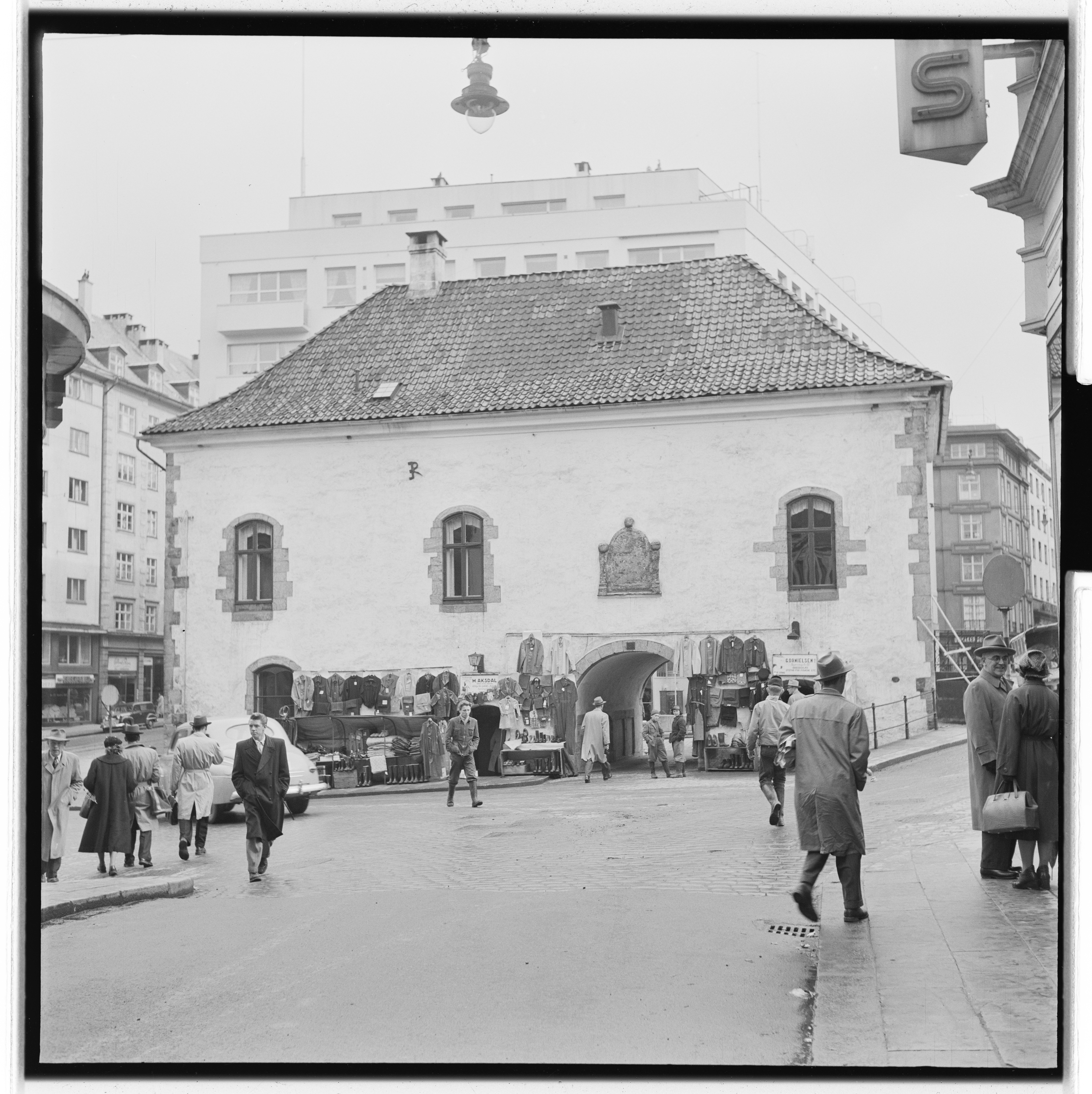 Bildet er hentet fra Arkivverket. Butikk på gata, Bergen. NÅ nr. 9, 1955 Arkivinstitusjon : Riksarkivet Arkivnavn : Billedbladet NÅ Sted : Norge, Hordaland, Bergen, Ukjent Emneord: Bymiljø, Arkitektur Avbildet